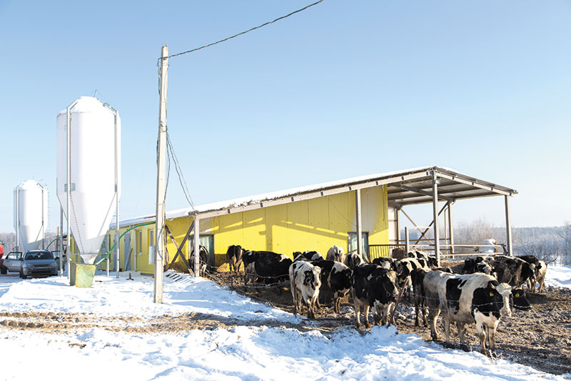 Роботизированная ферма Саяпина, Мосальский район Калужской области